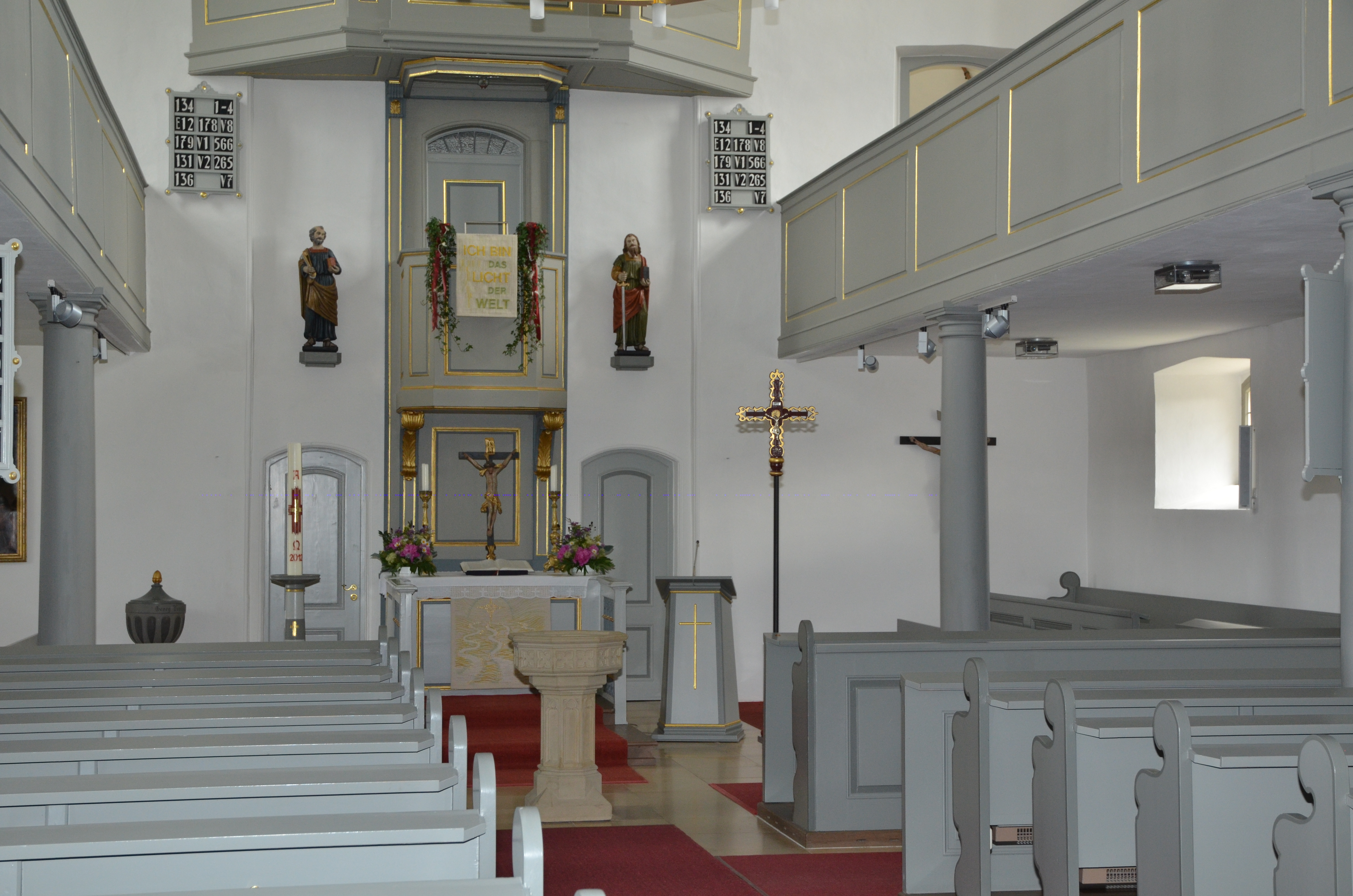 evang.-luth. Kirche St. Kilian in Geslau